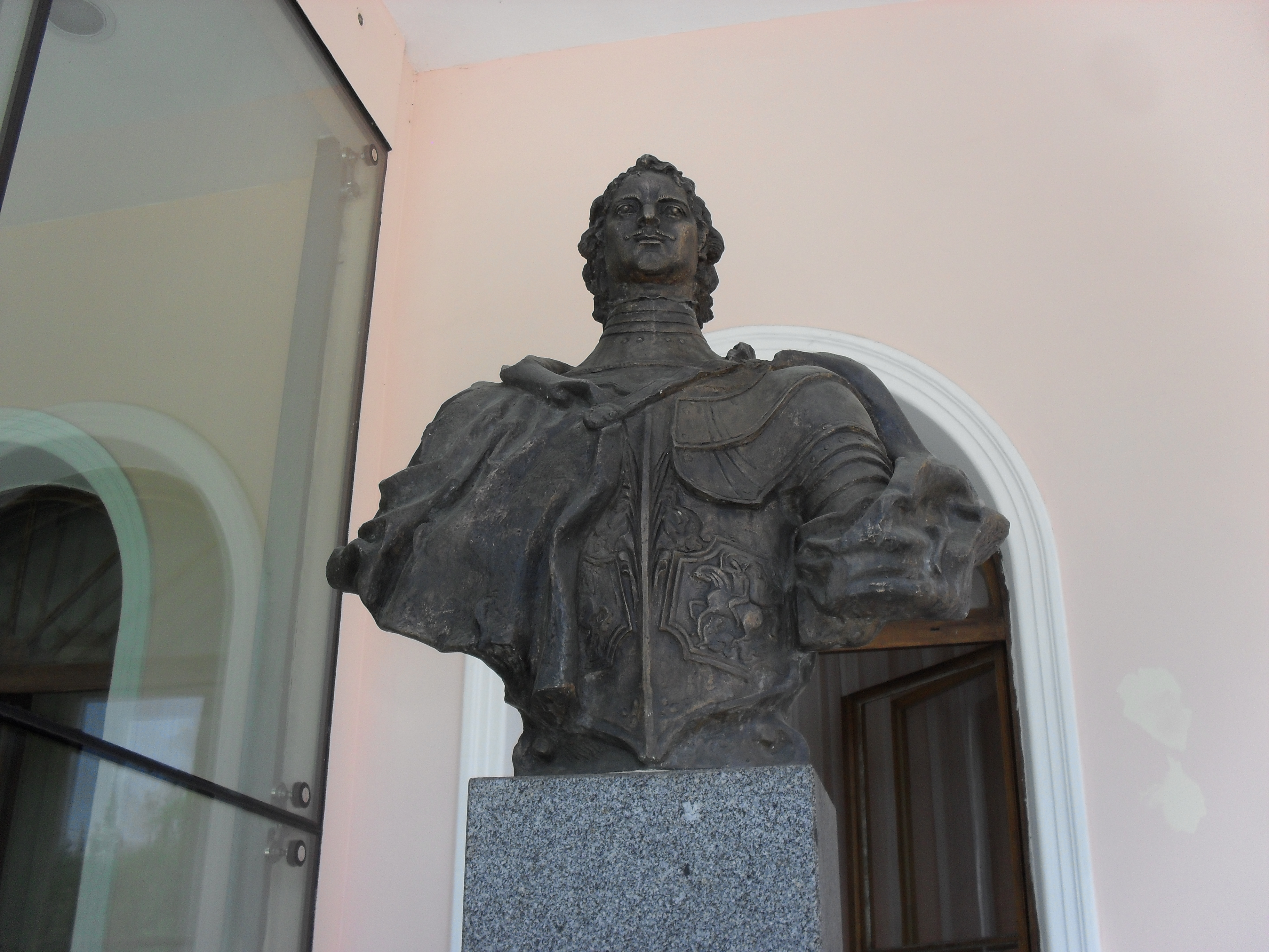 Lázeňský dům Císařské lázně (Teplice)- Teplice, Laubeho náměstí 227/2. POMNÍK PETRA I., VELIKÉHO.